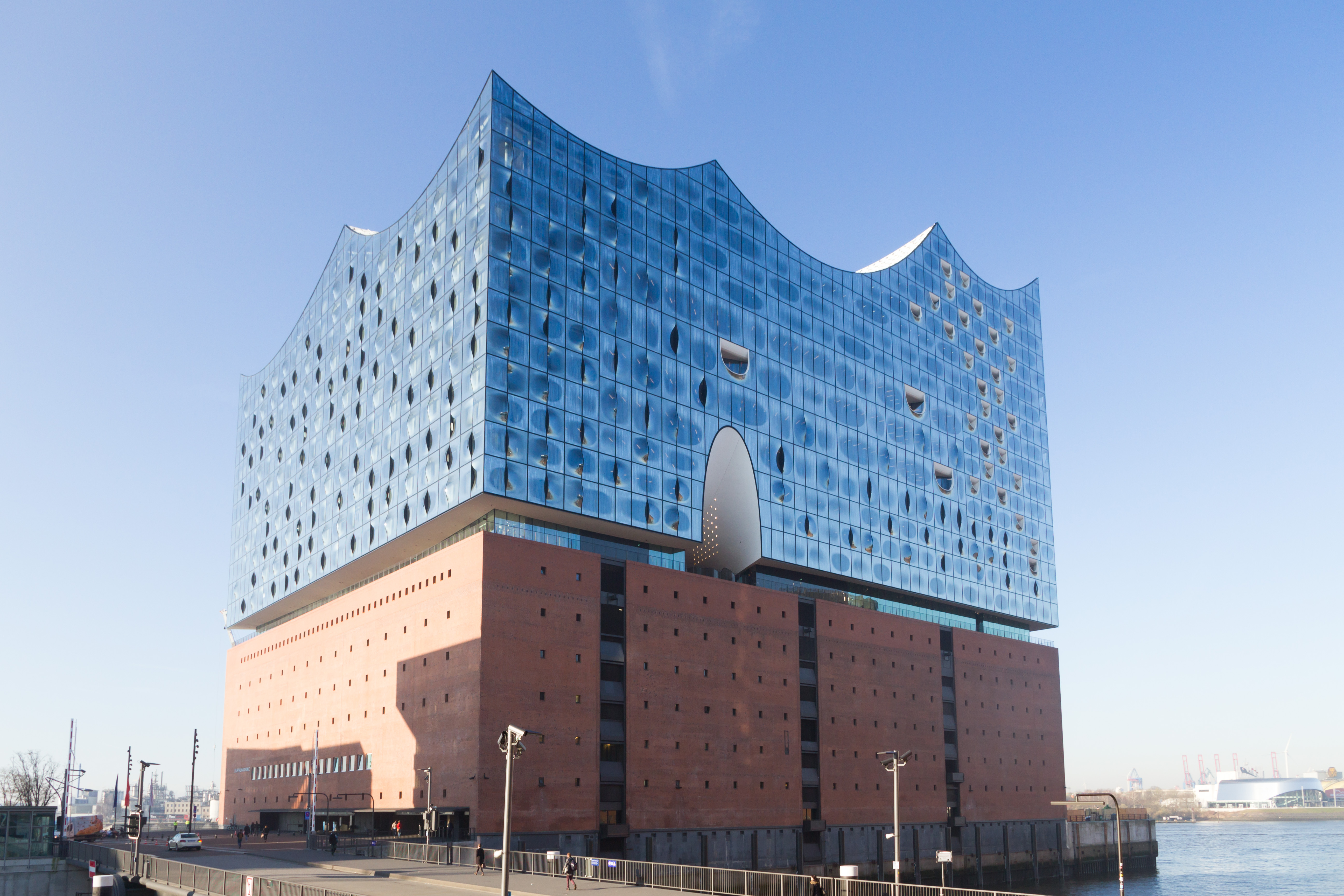 Elbphilharmonie